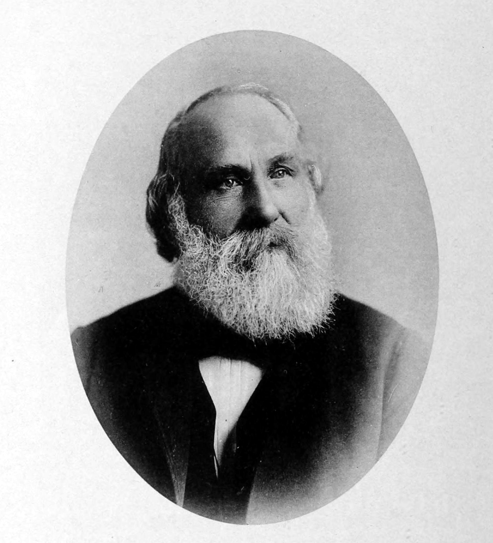 Portrait Charles Theodore Mohr